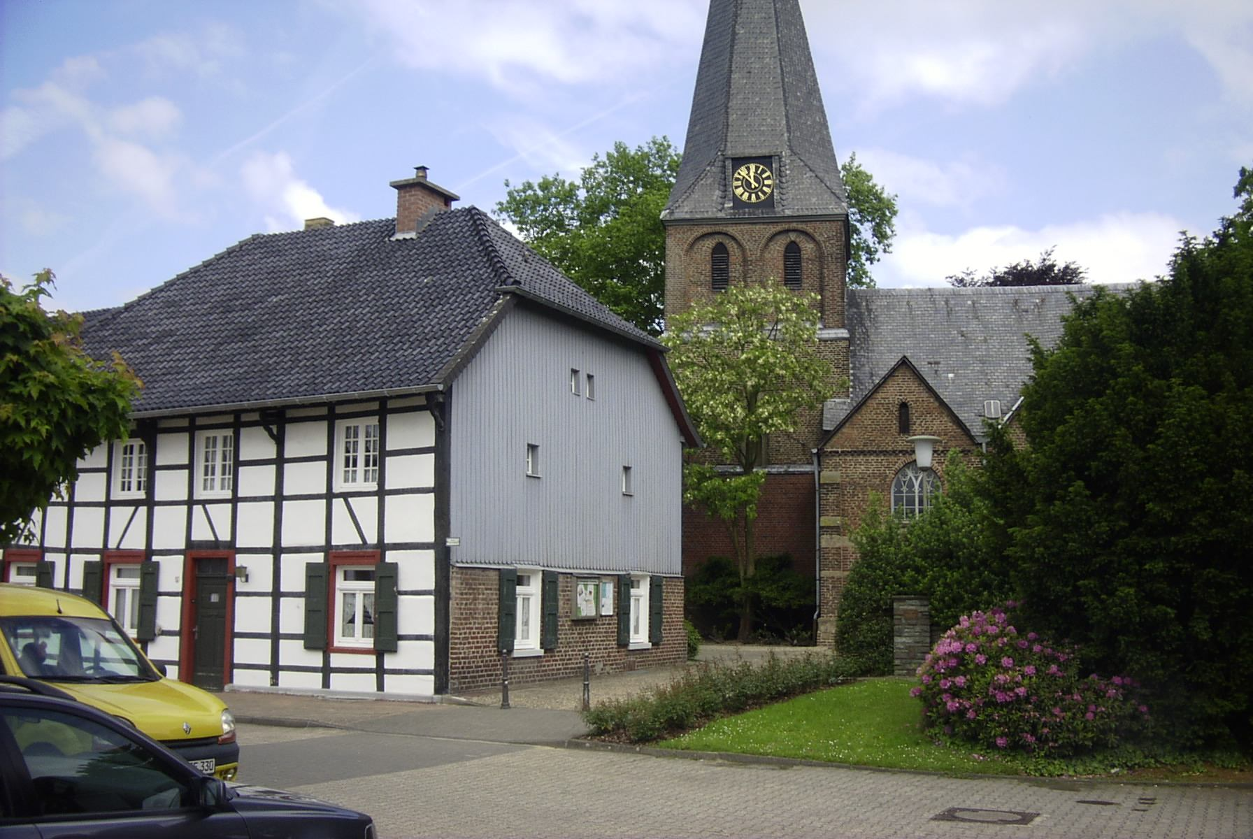 Summary Bildbeschreibung: Evangelische Pfarrkirche Schwanenberg Quelle: eigenes Foto Fotograf/Zeichner: bodoklecksel 17:20, 4. Jun 2006 (CEST) Datum: Juni 2004 Sonstiges: ...